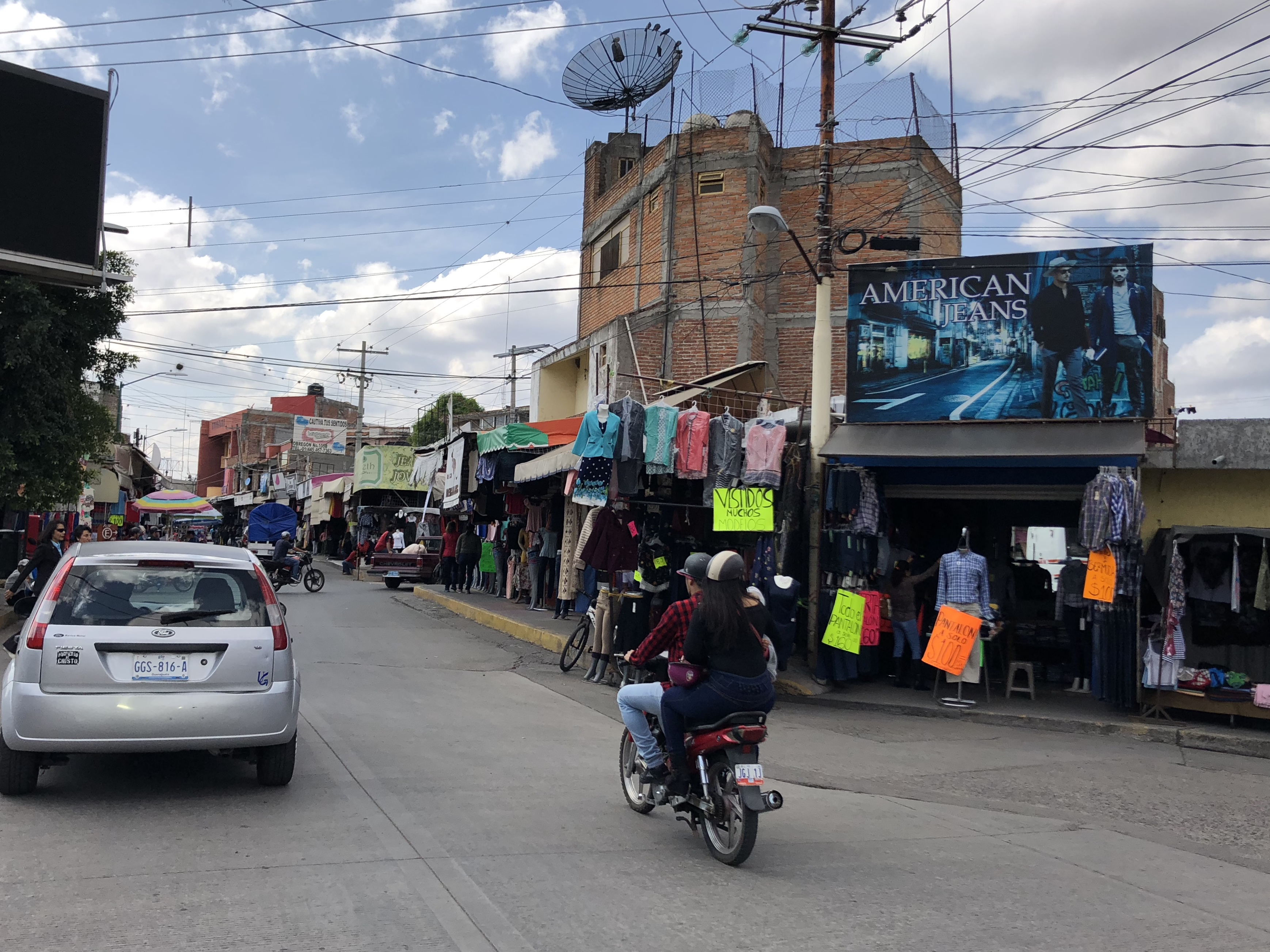 Zona Comercial Textil Uriangato Bulevar Leovino Zavala, imagen que muestra los puestos de ropa de Uriangato.